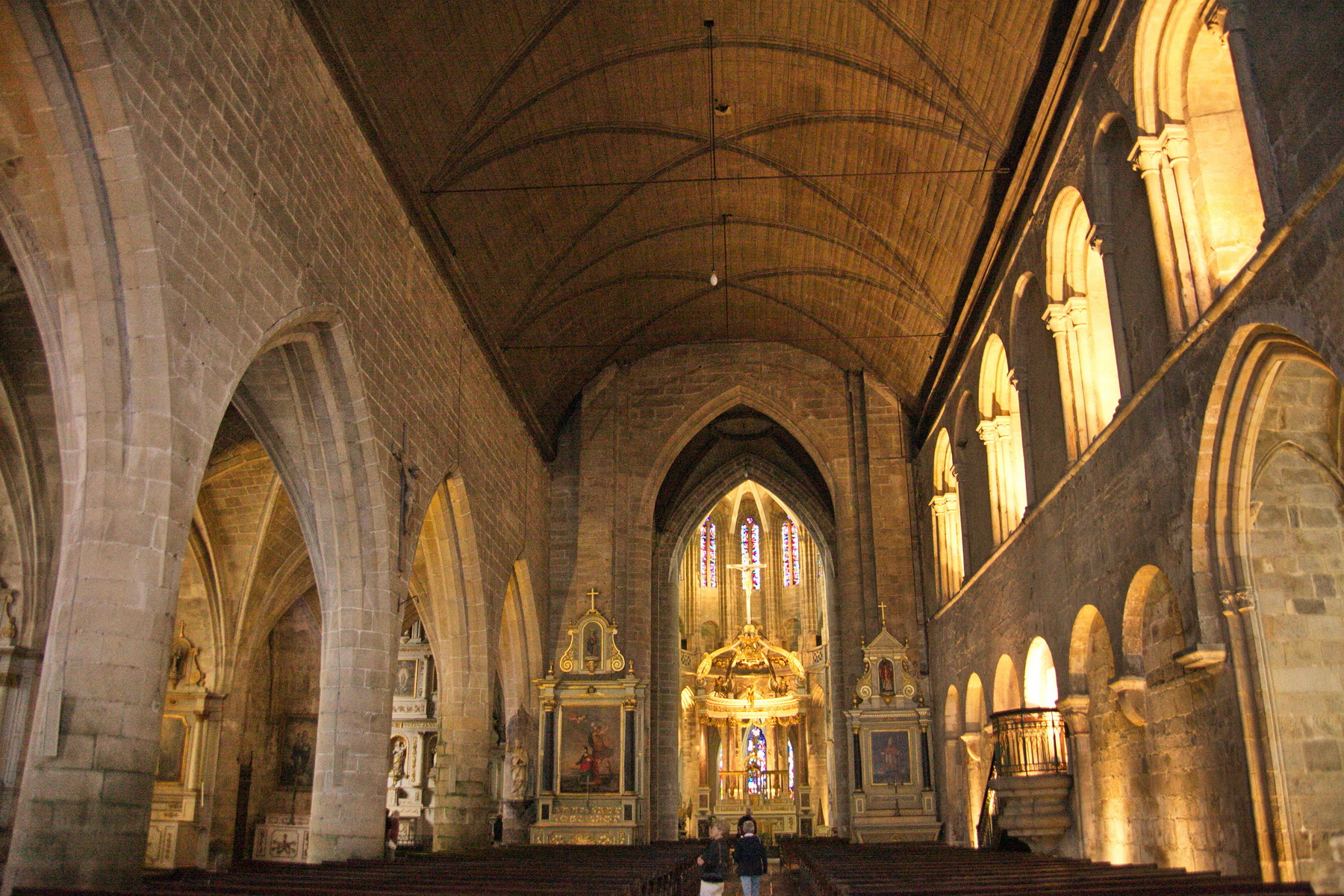 Basilique Saint-Sauveur (Classé) .